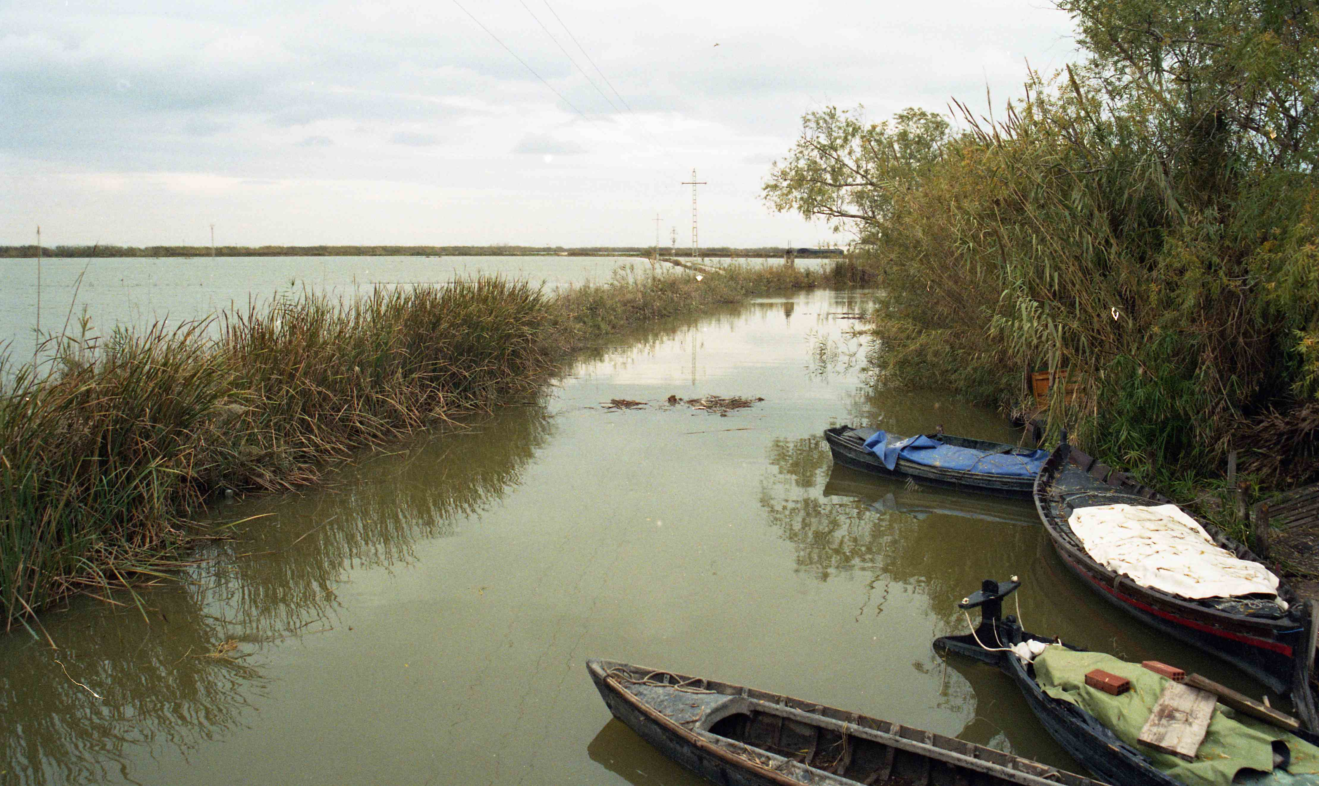 Parc Natural de l'Albufera de València This is a a photo of a wetland in the Land of Valencia, Spain, with id: CZHCV-7